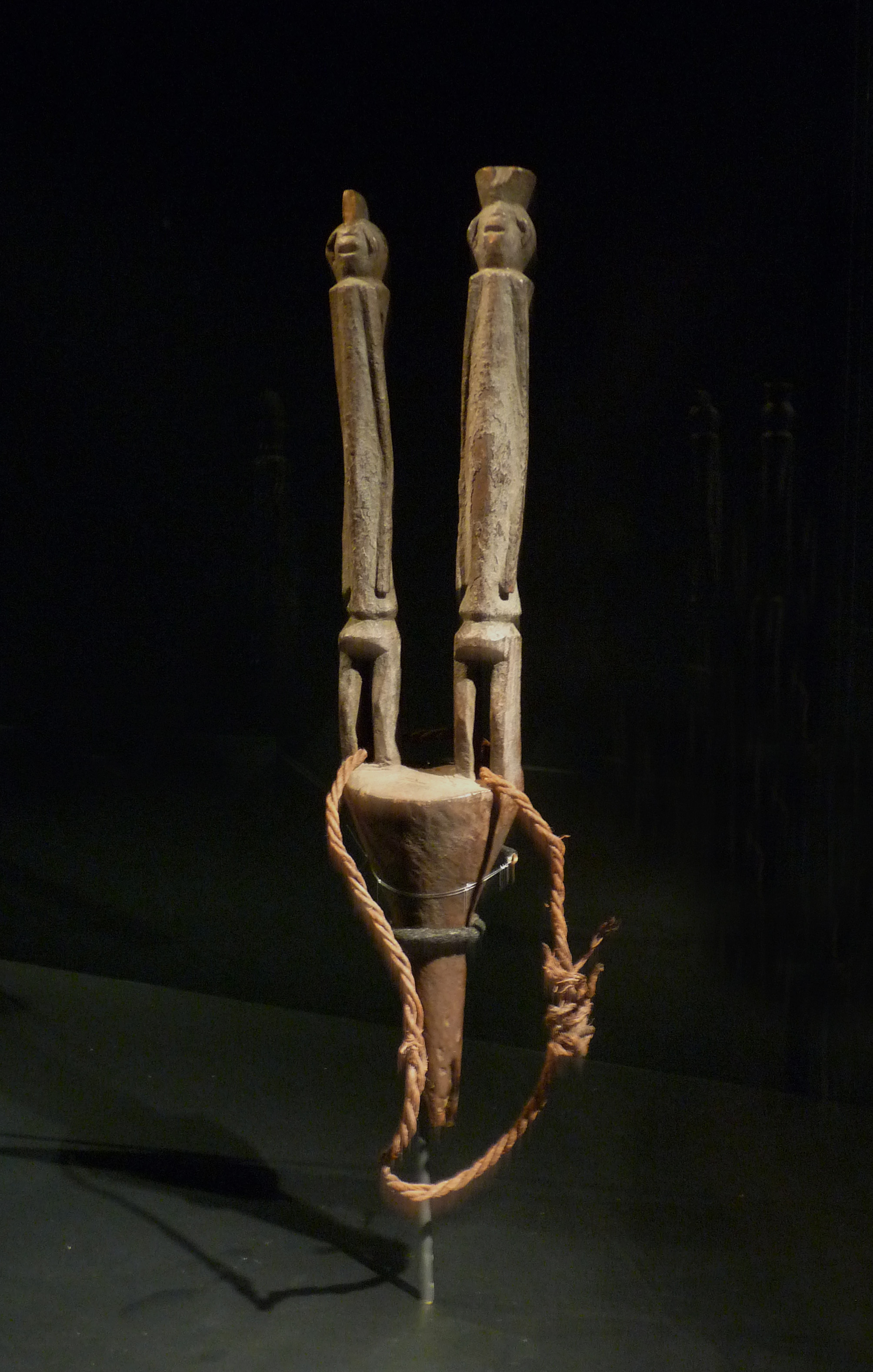 Chamba : double statue-colonne. Antérieur à 1903. Bois, corde. Staatliche Museen zu Berlin. Exposition Nigeria. Arts de la vallée de la Bénoué au musée du quai Branly (Paris).